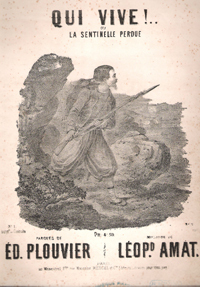 Couverture d'une partition de chanson : paroles de Édouard Plouvier, musique de Léopold Amat.